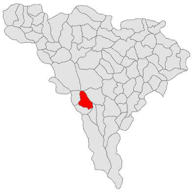 Categorie:Hărţi ale judeţului Alba